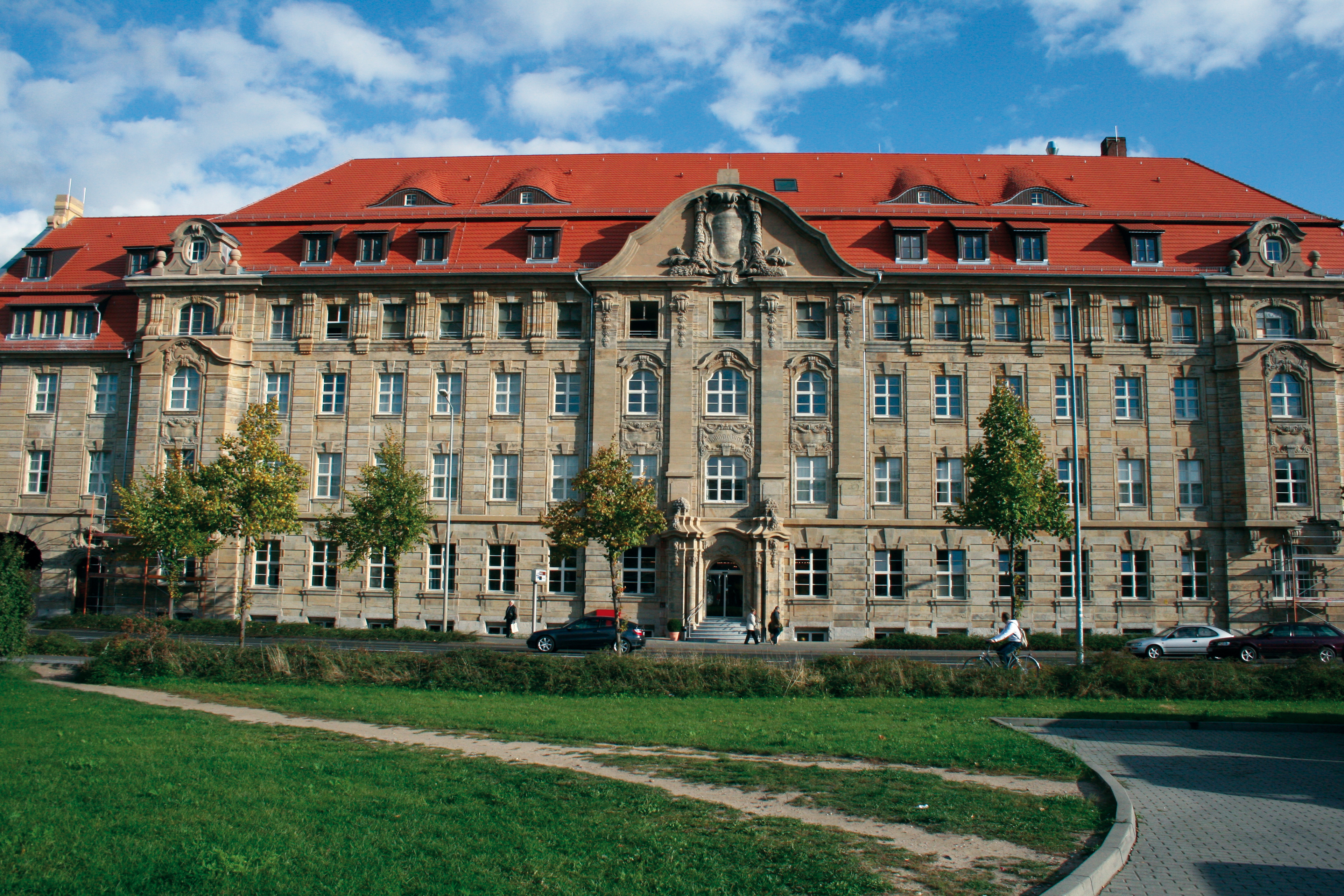 Das Foto zeigt die Frontansicht des Bahnpostamts Leipzig nach der Sanierung im Jahr 2008.